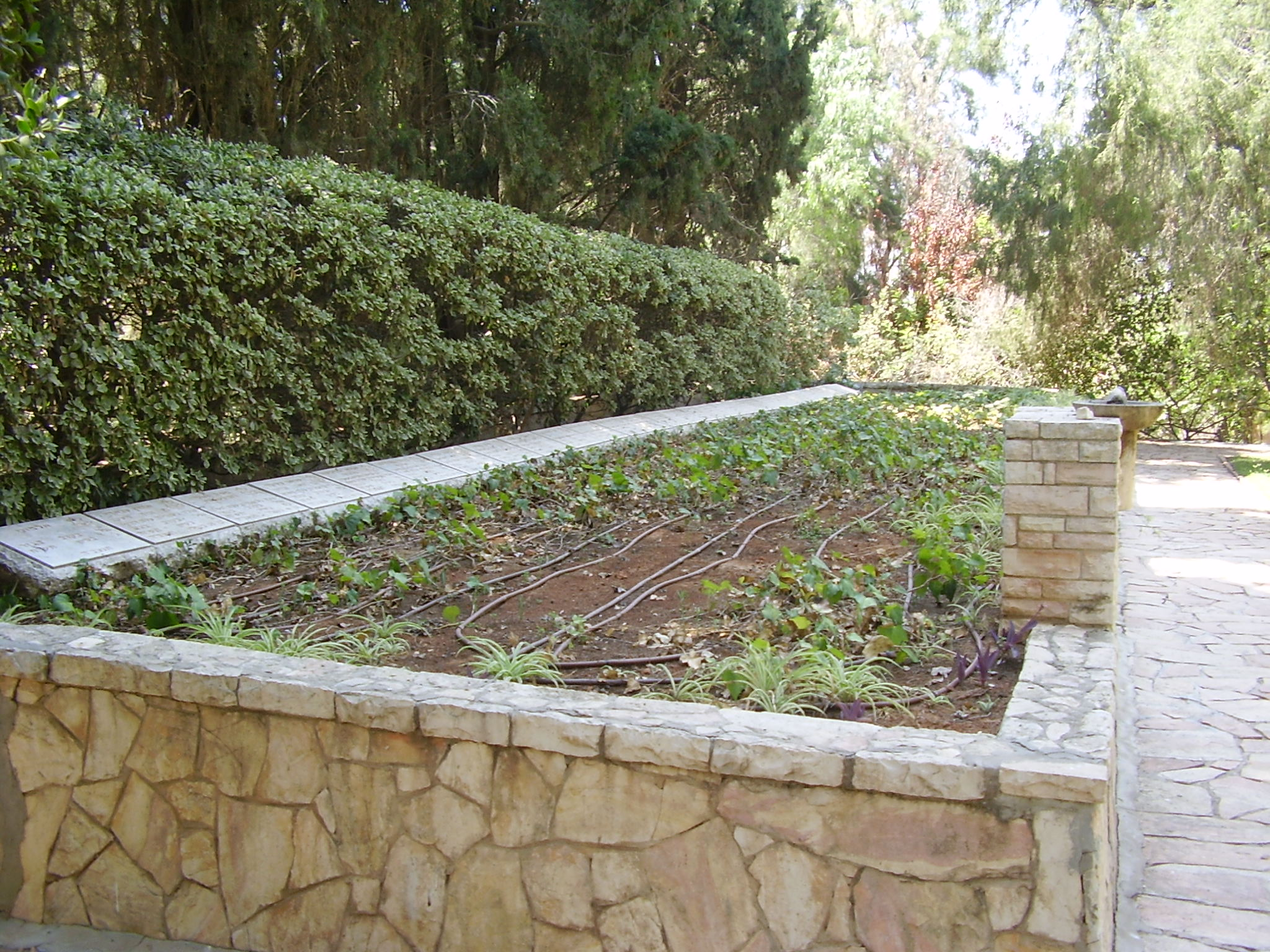 קבר אחים בבית בעלמין בקיבוץ גזר, לחללי קרב גזר במלחמת העצמאות